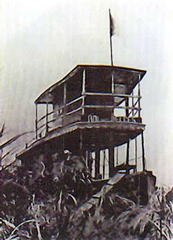 Image ancienne Origine : Bateau de l'État indépendant du Congo qu'a emprunté Joseph Conrad, et évoqué dans Heart of Darkness.